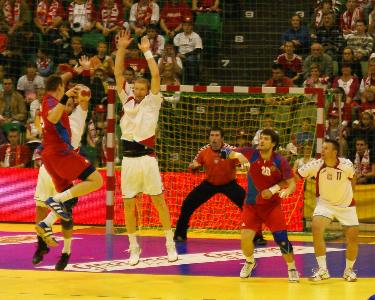 Mecz Polska - Rosja, Turniej Reprezentacji Narodowych Mężczyzn w Piłce Ręcznej, Hala widowiskowo-sportowa Arena, Poznań, Polska.